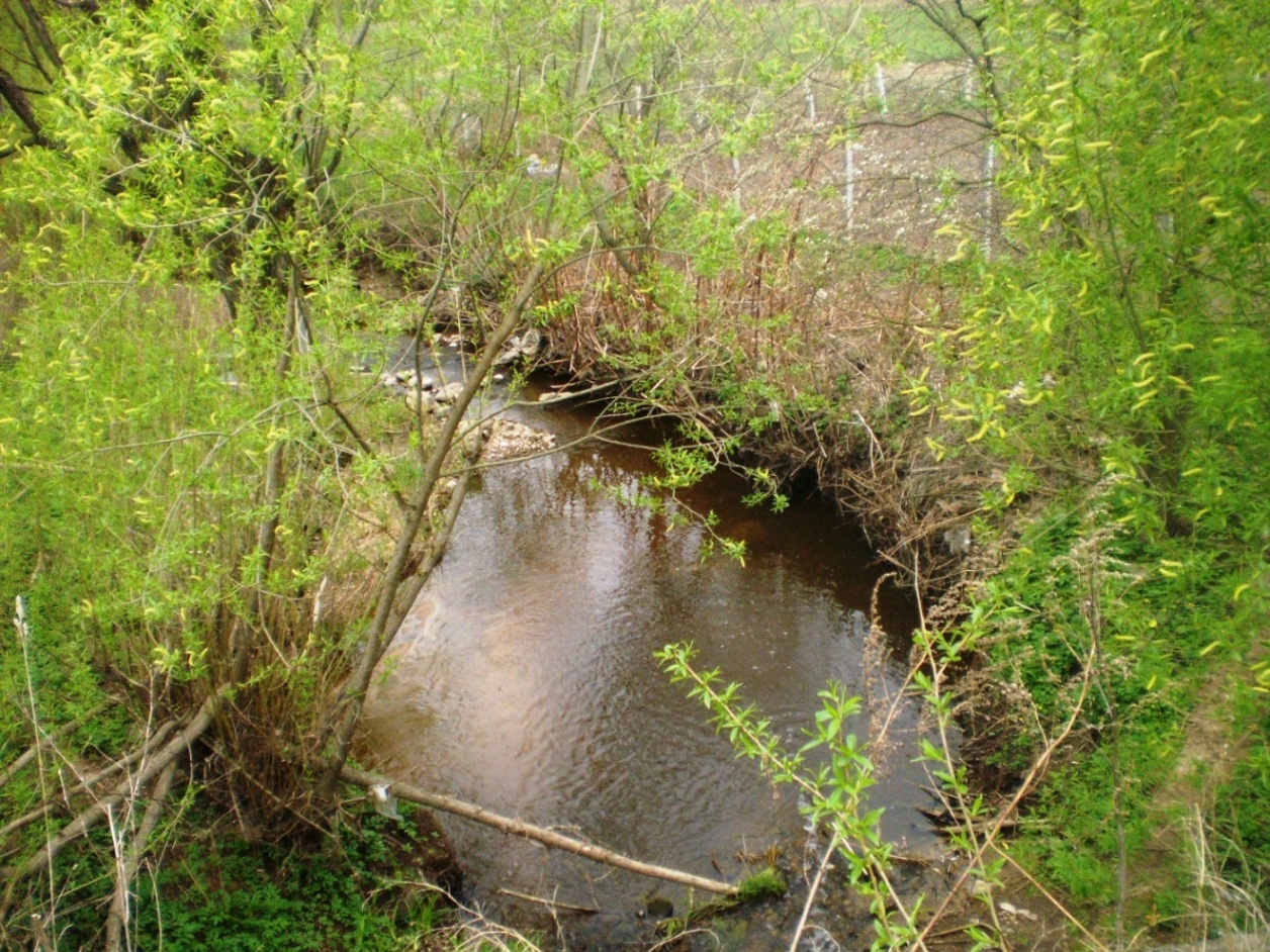 Alkupis prie Apytalaukio, Kėdainių raj.